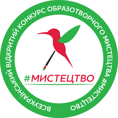 Логотип Всеукраїнського конкурсу образотворчого мистецтва #МИСТЕЦТВО